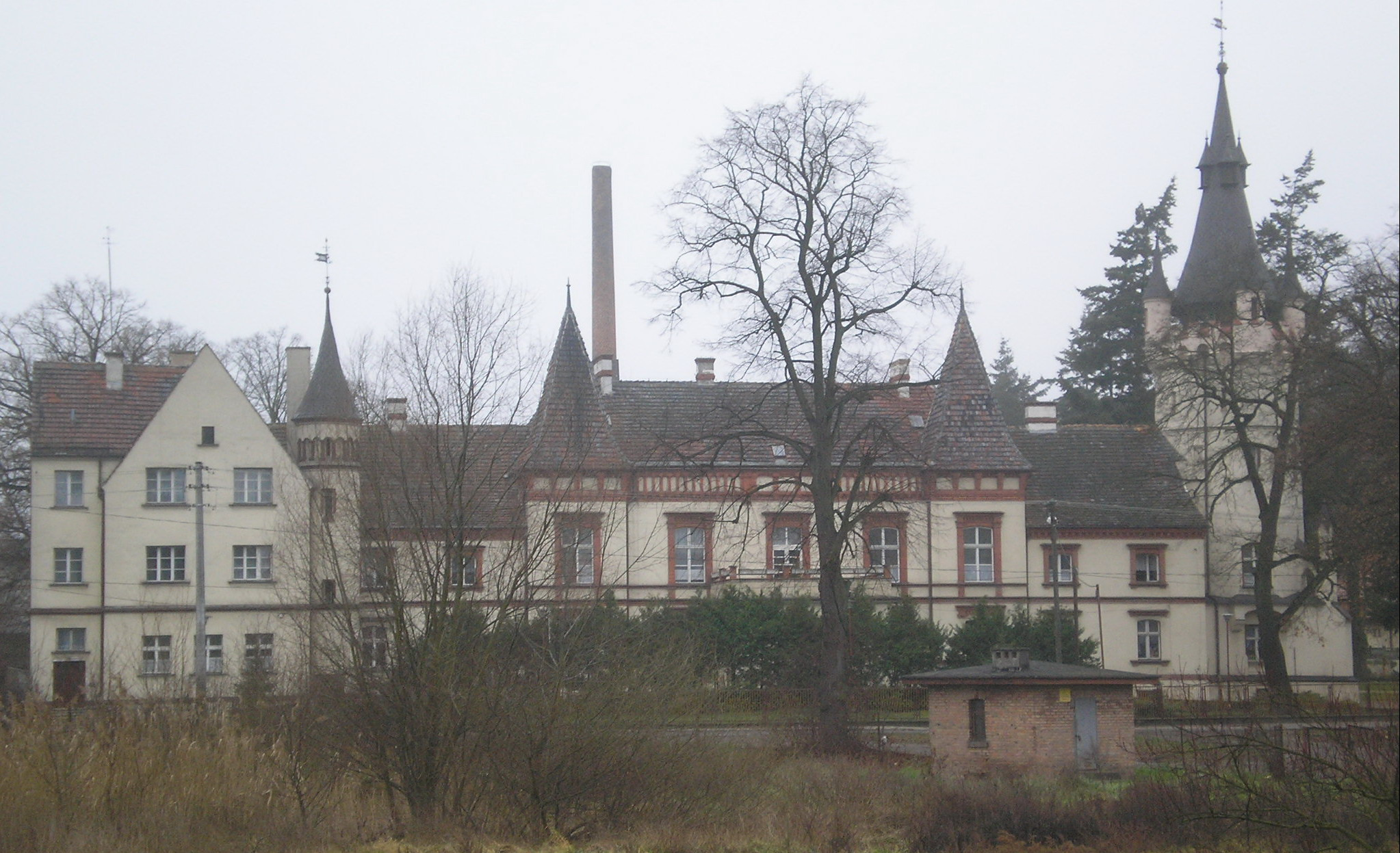 DPS Toporów